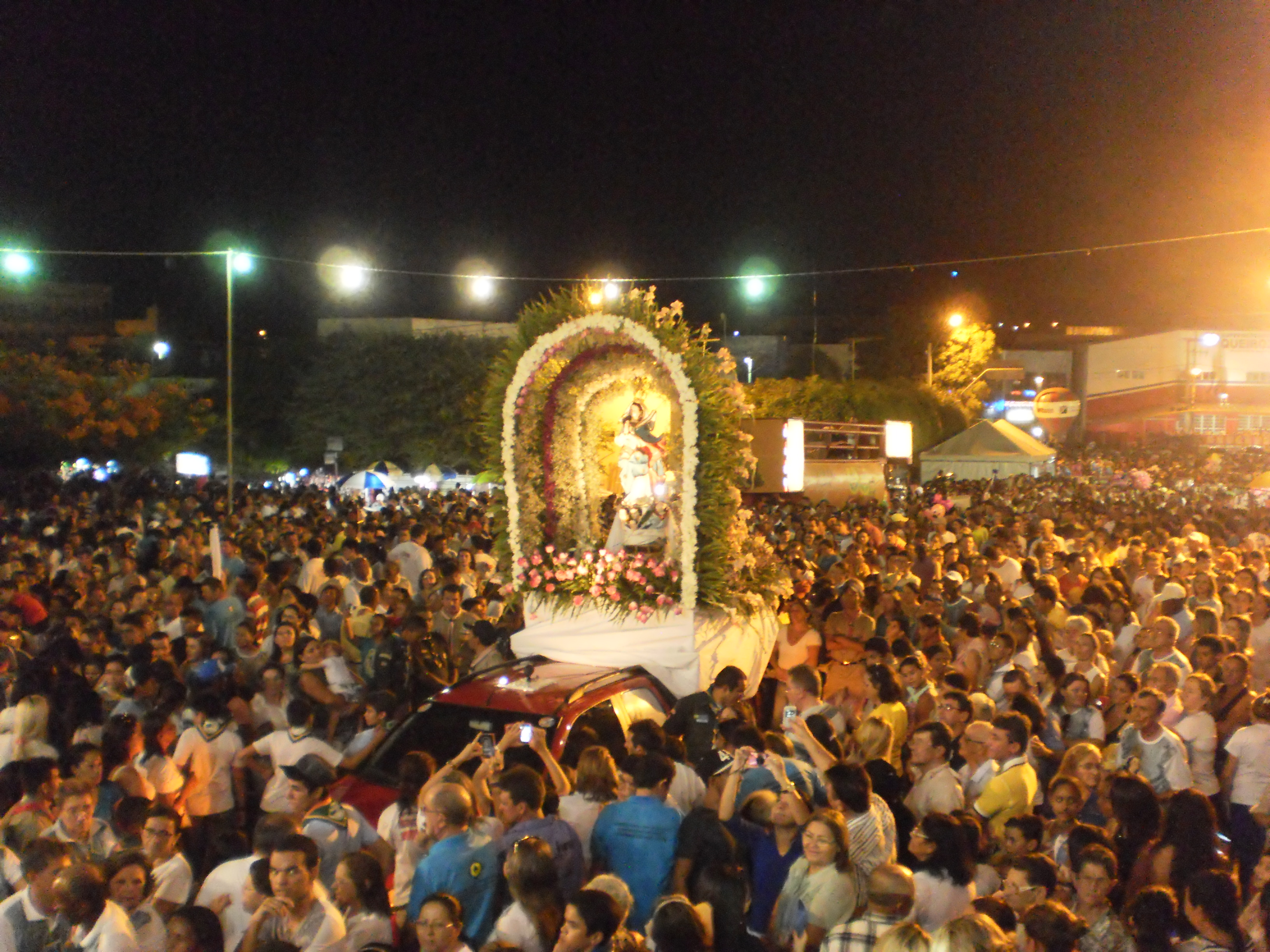 Procissão de encerramento da festa de Nossa Senhora da Conceição de Pau dos Ferros, principal festa religiosa do Alto Oeste do Rio Grande do Norte (Brasil).